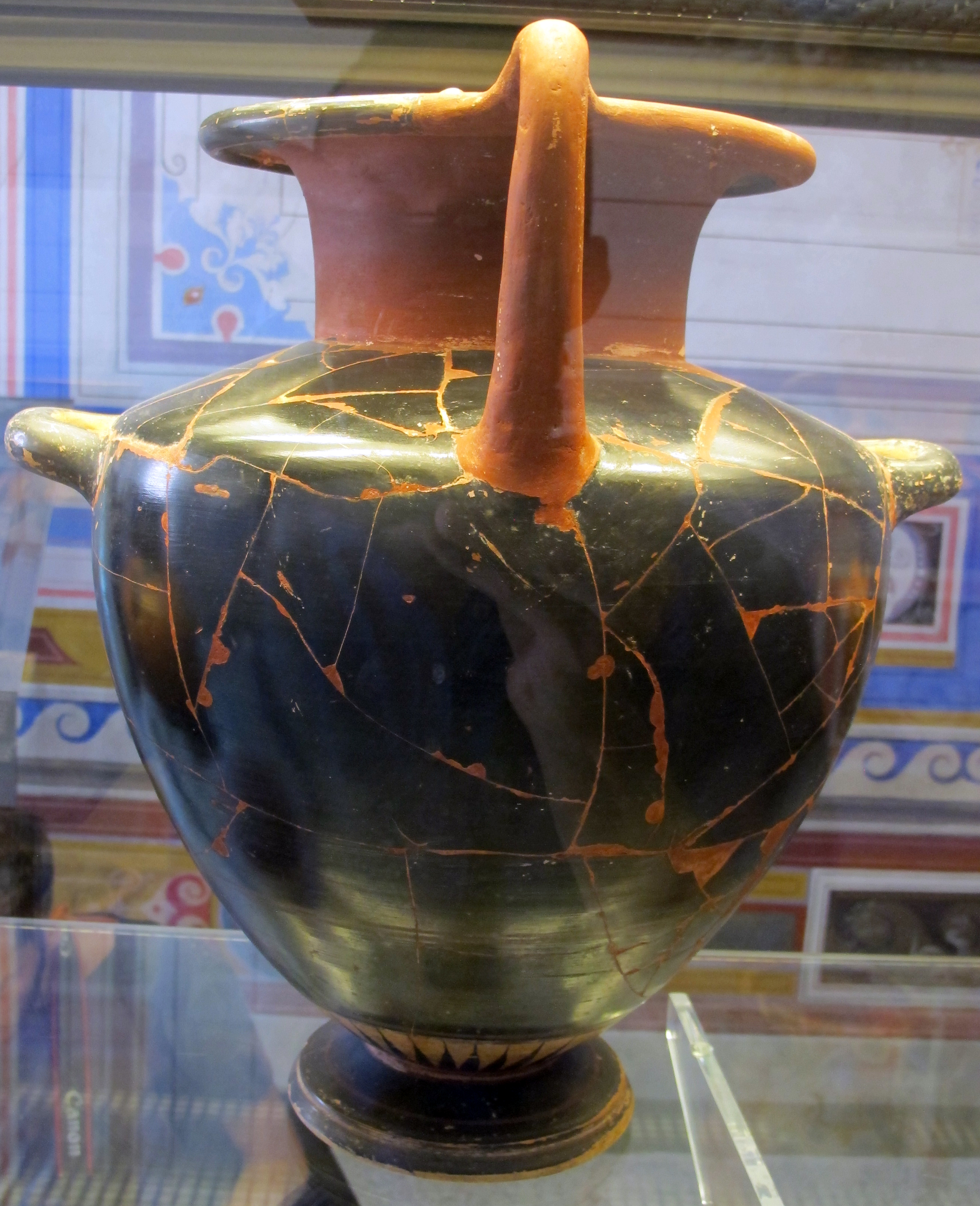 Museo Claudio Faina